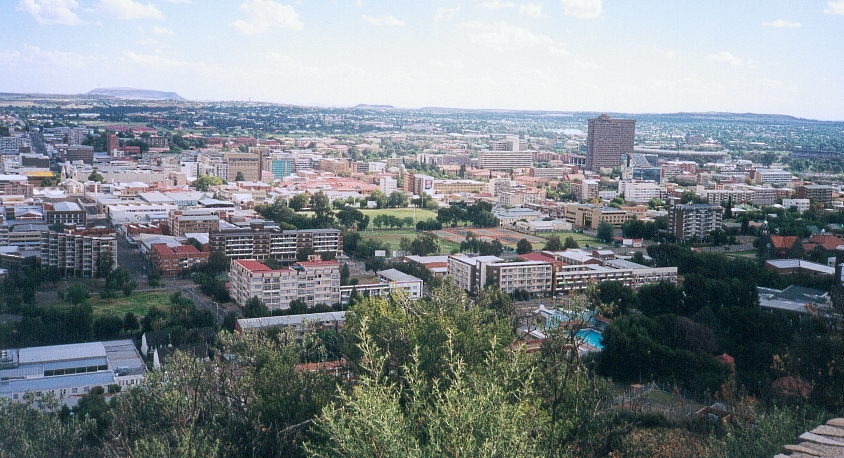 FC Georgio Vue sur Bloemfontein depuis Naval Hill (1998)